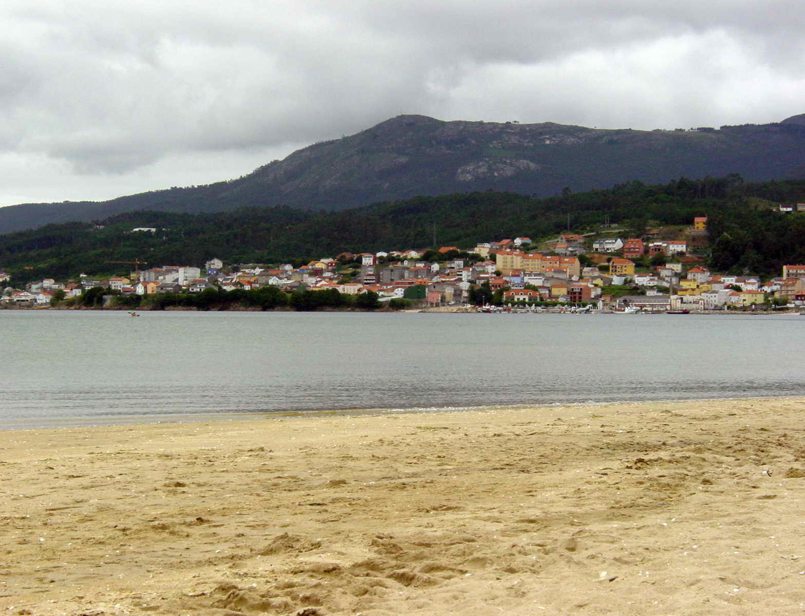 Escarabote, Boiro